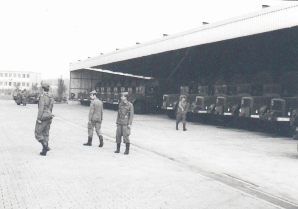 Technisch Bereich